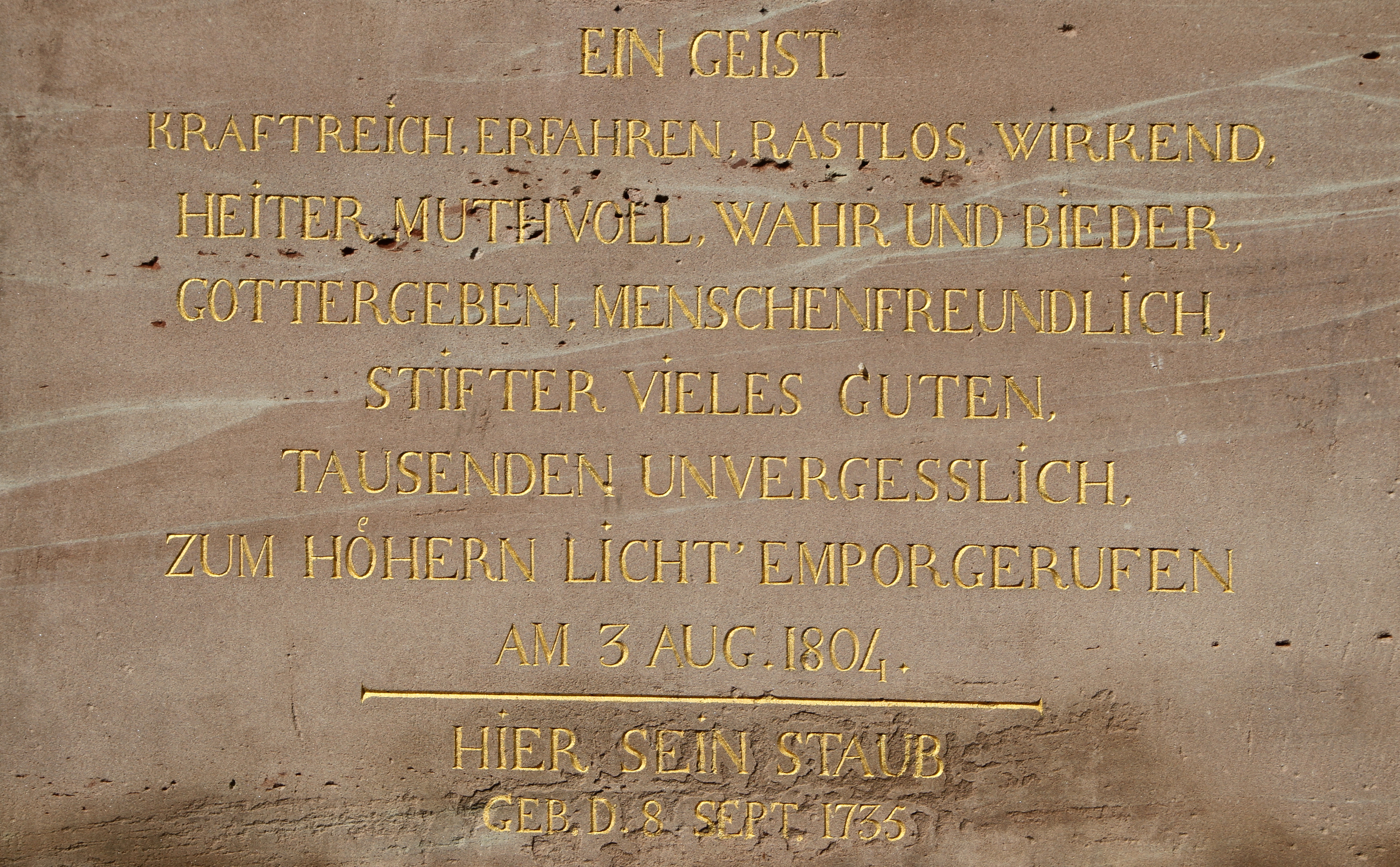 Köln-Mülheim, Grabmal der Familie Christoph Andrae